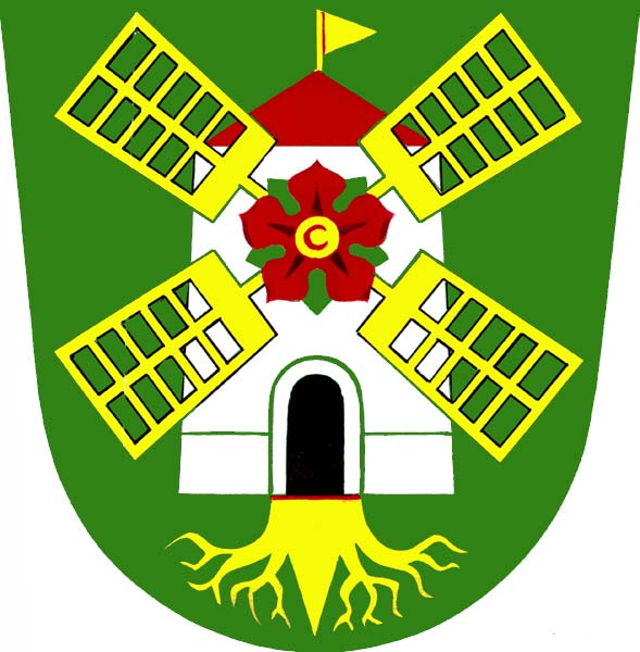 Znak obce Kořenec